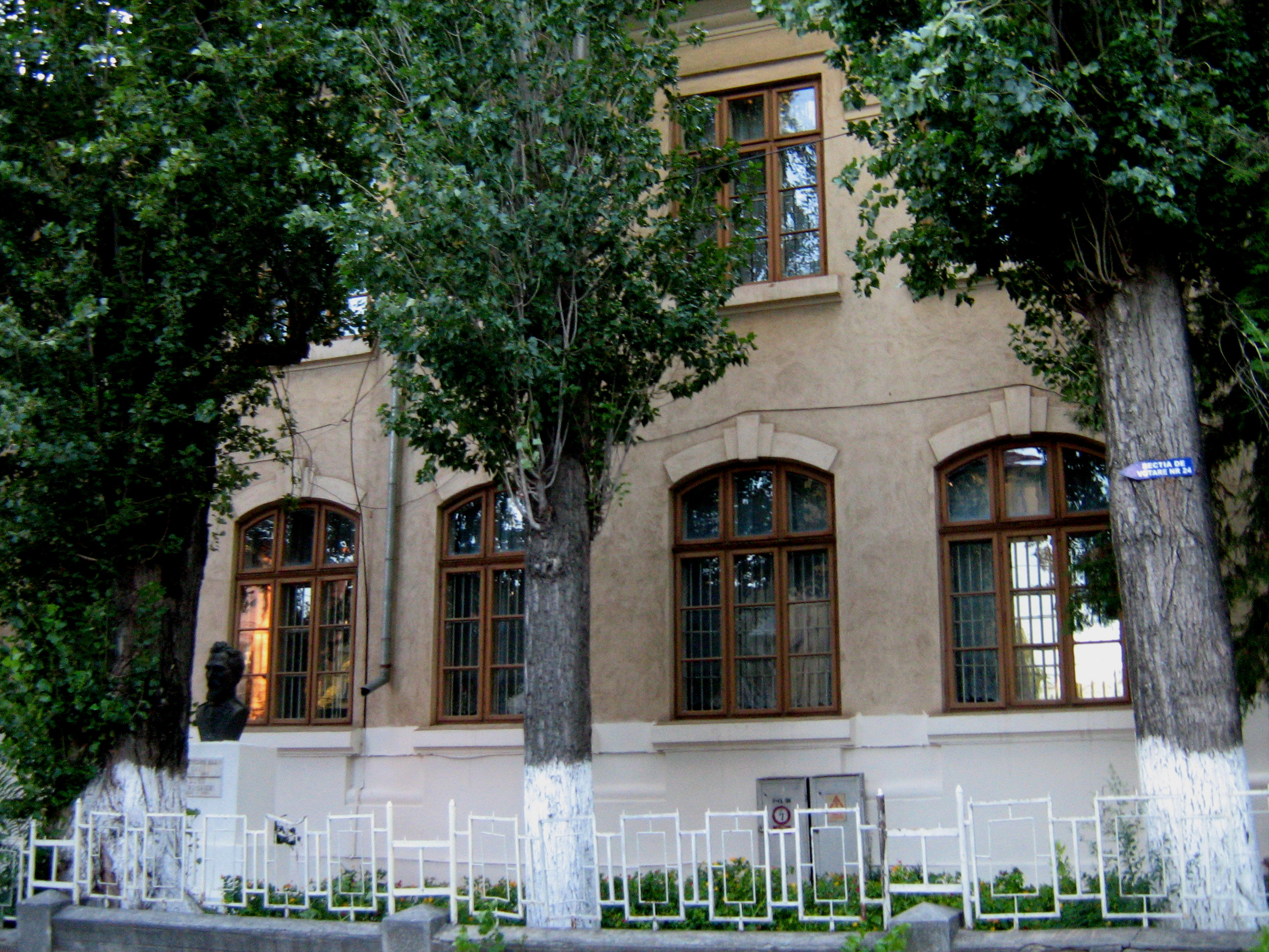 Galati - Liceul israelit azi Colegiul Al I Cuza